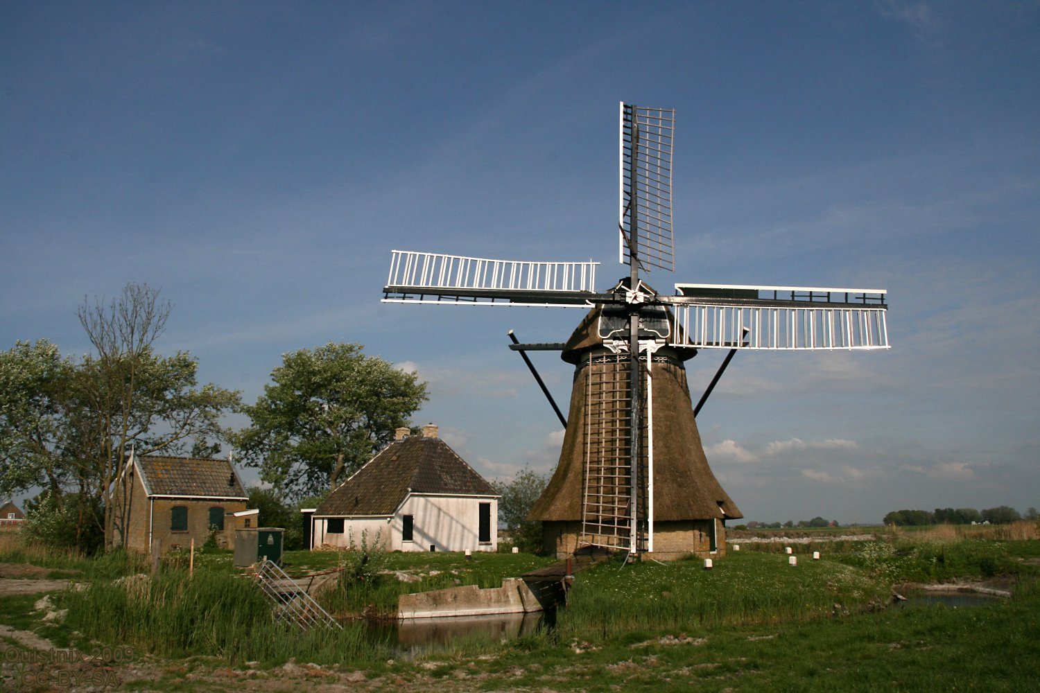 Achlum: Achlumer Molen